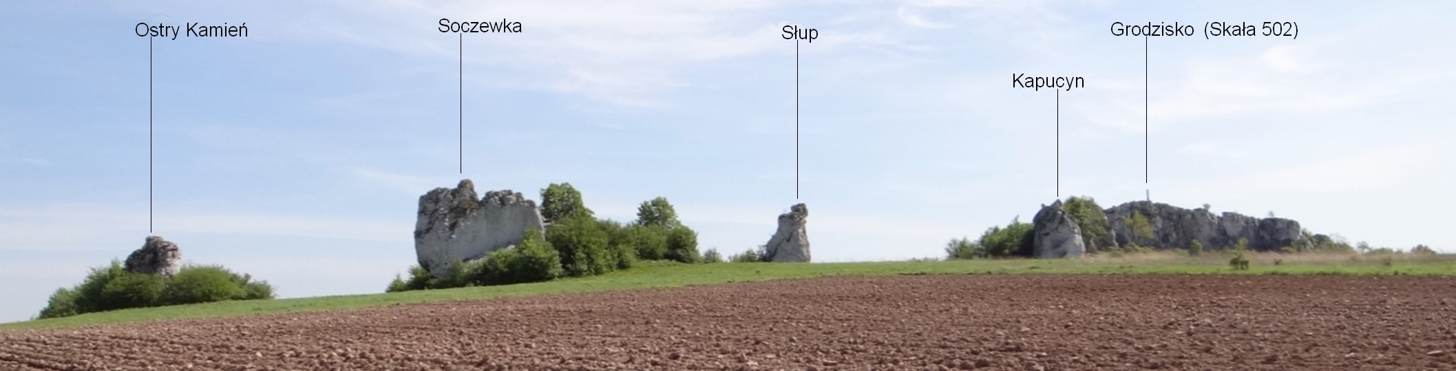 Ostańce Jerzmanowickie, widok od zachodniej strony